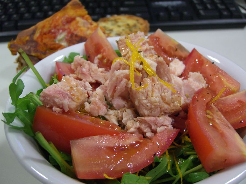 Tuna salad